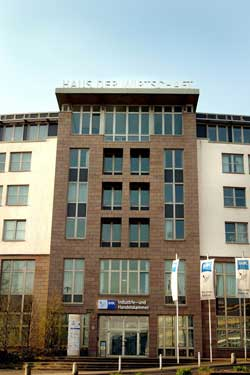 Gebäude der IHK Kassel